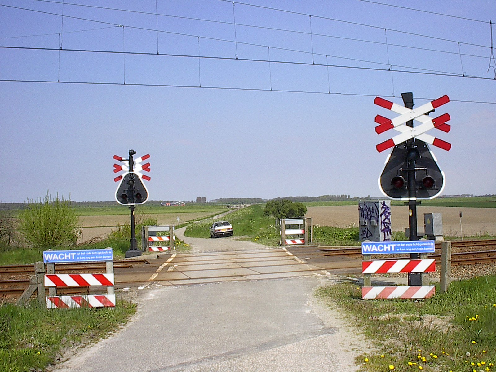 Gemaakt in het kader van het AKI-AHOB-ombouwprogramma. Toestemming voor gebruik van de maker dhr Benner. Licensing Spoorwegovergang (AKI) Noord Kraaijertsedijk in Goes (Nederland)